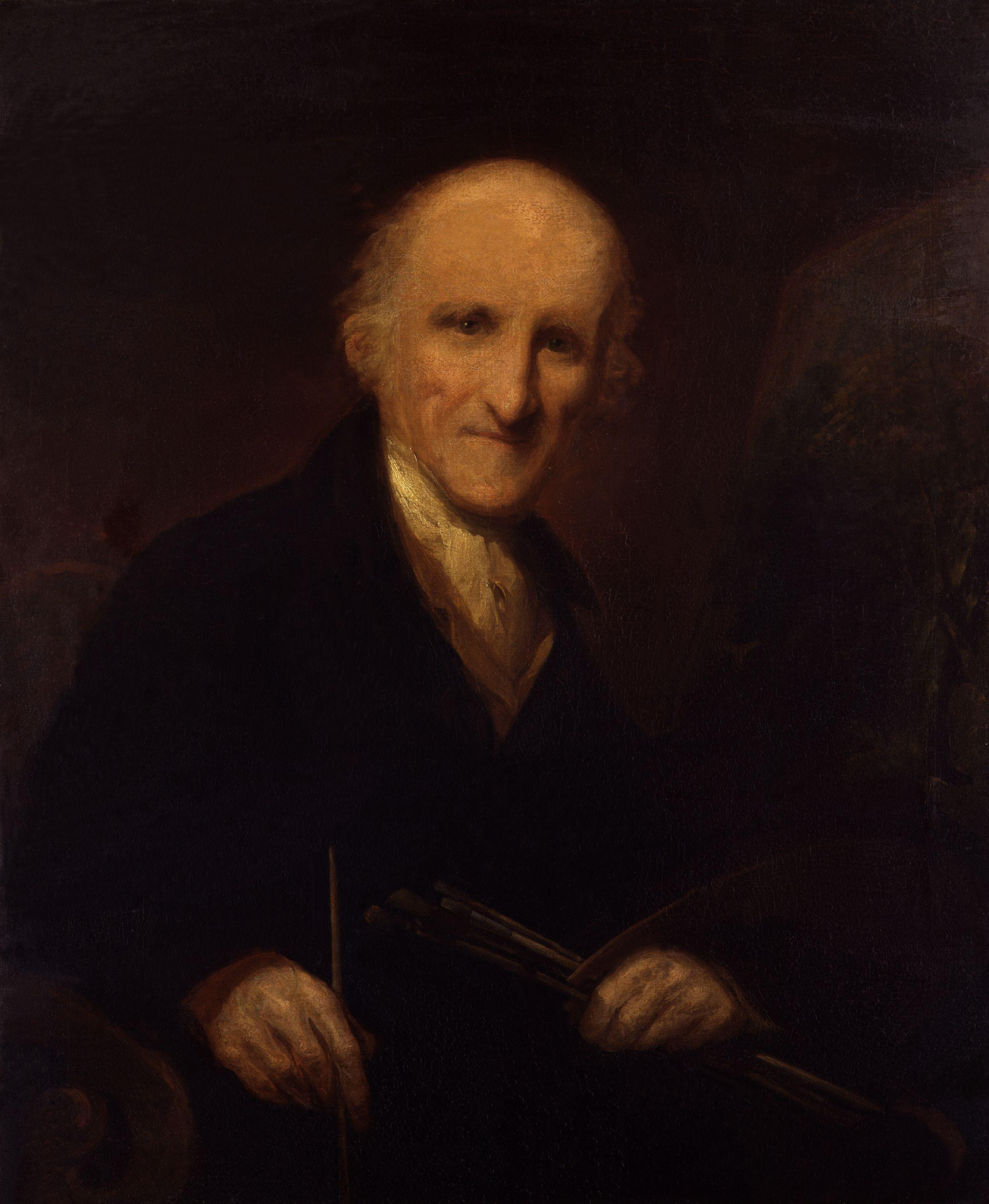 Self-portrait